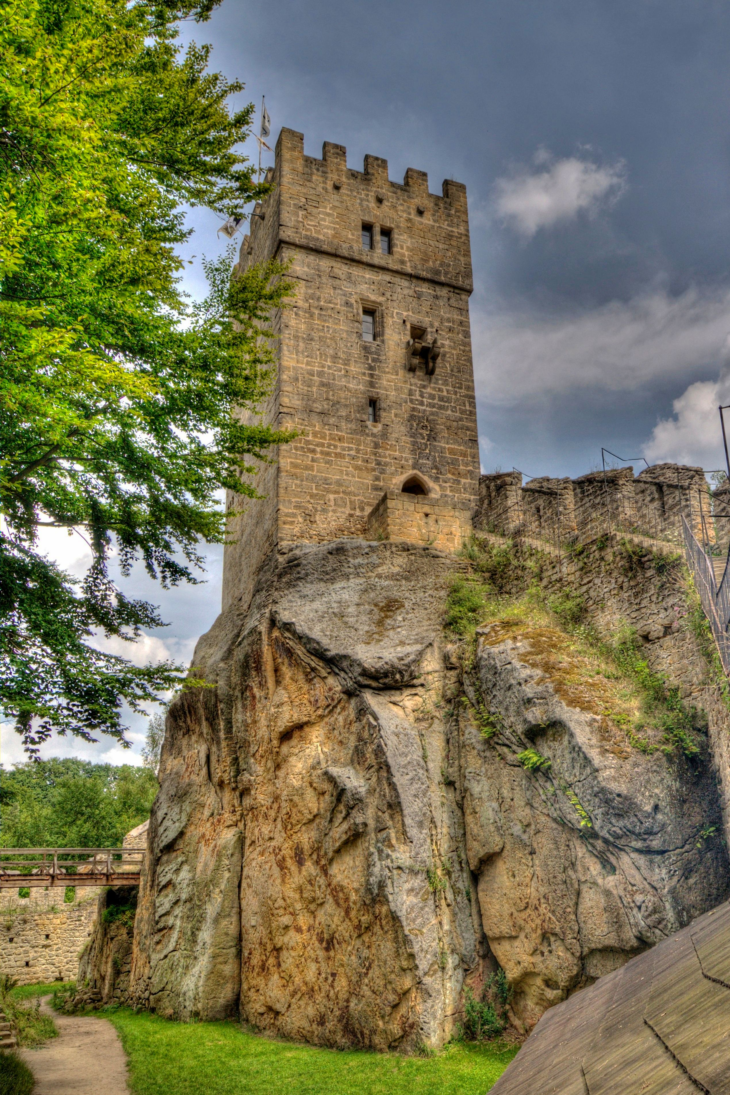 Hlavní věž, pohled z nádvoří dolního hradu od jihozápadu